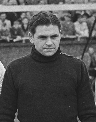 Ад Виссер.